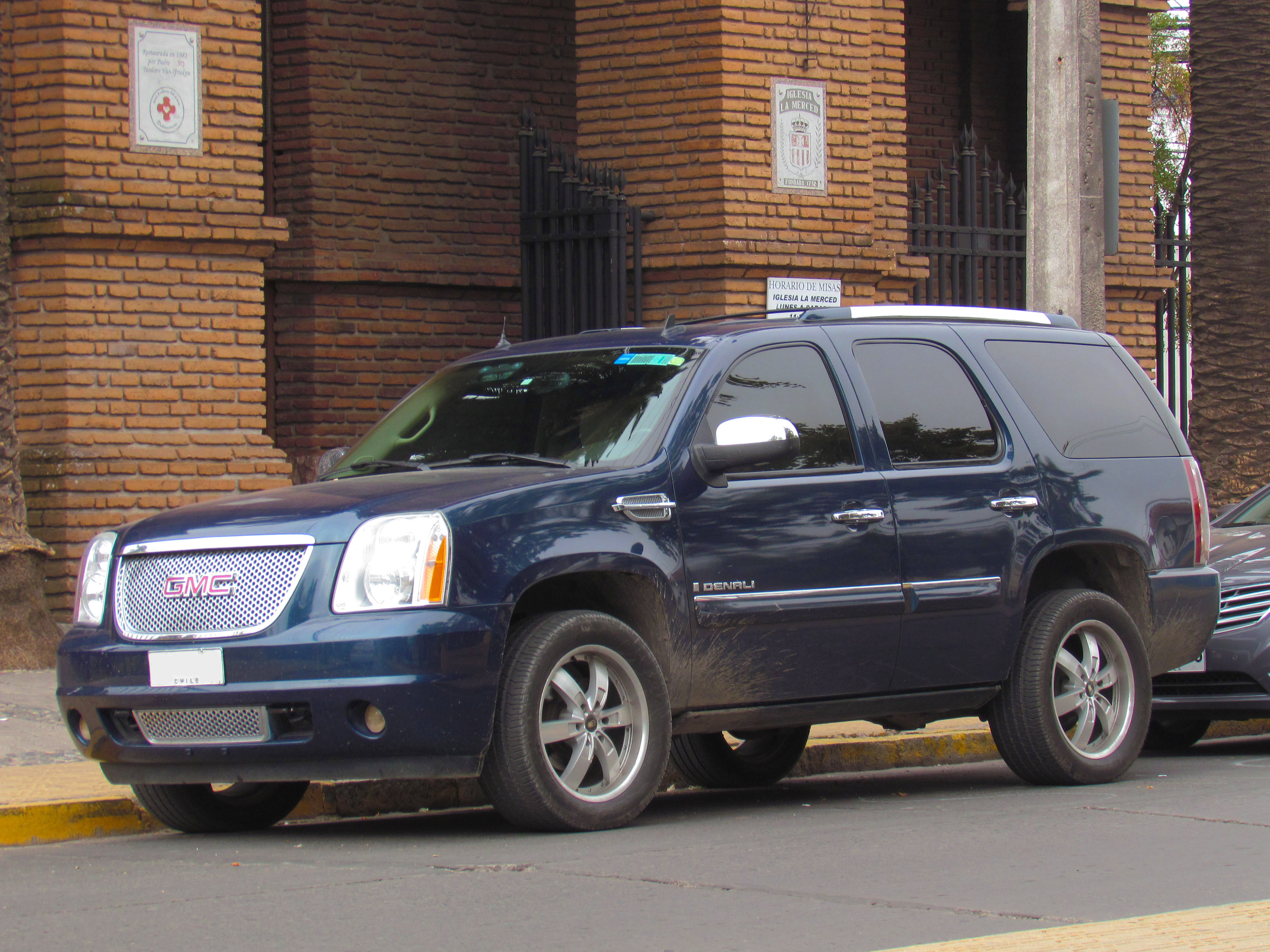 GMC Yukon Denali 2008